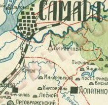 Карта Самарской губернии 1092 года